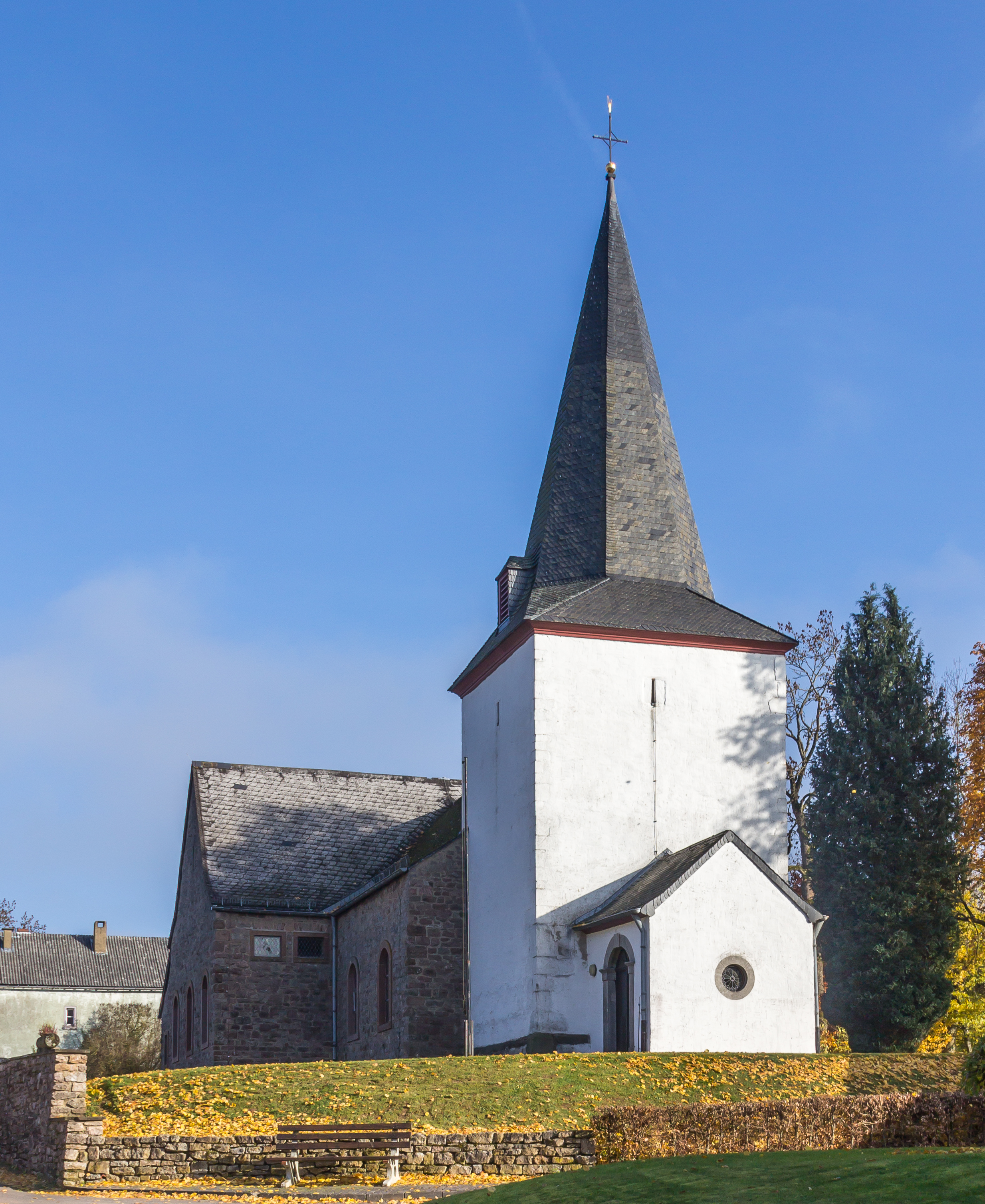 Kath. Filialkapelle St. Luzia, Engelgau, Nettersheim